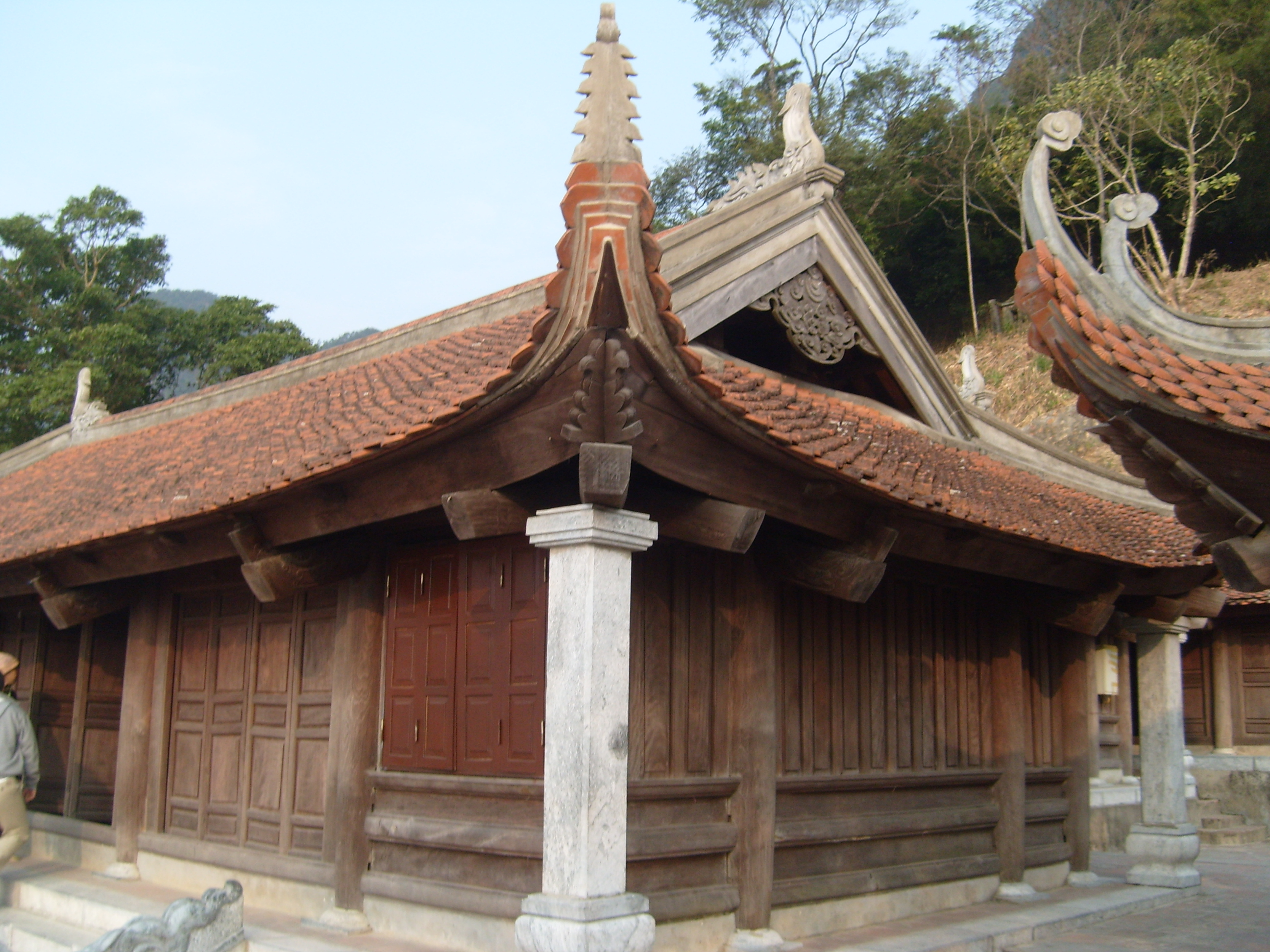 Chùa Hoa Yên